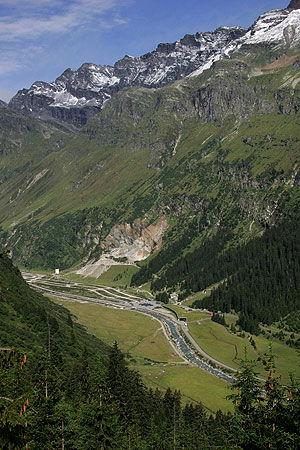 Hinterrhein bei Hinterrhein